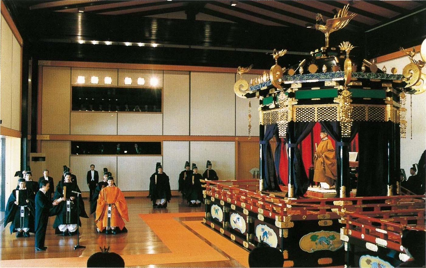 高御座に立つのは第125代天皇。寿詞を述べているのは海部俊樹元総理。その後ろには黄丹袍を着た皇太子徳仁親王（当時）や、束帯を着た常陸宮正仁親王・三笠宮崇仁親王・高円宮憲仁親王秋篠宮文仁親王らが並ぶ。